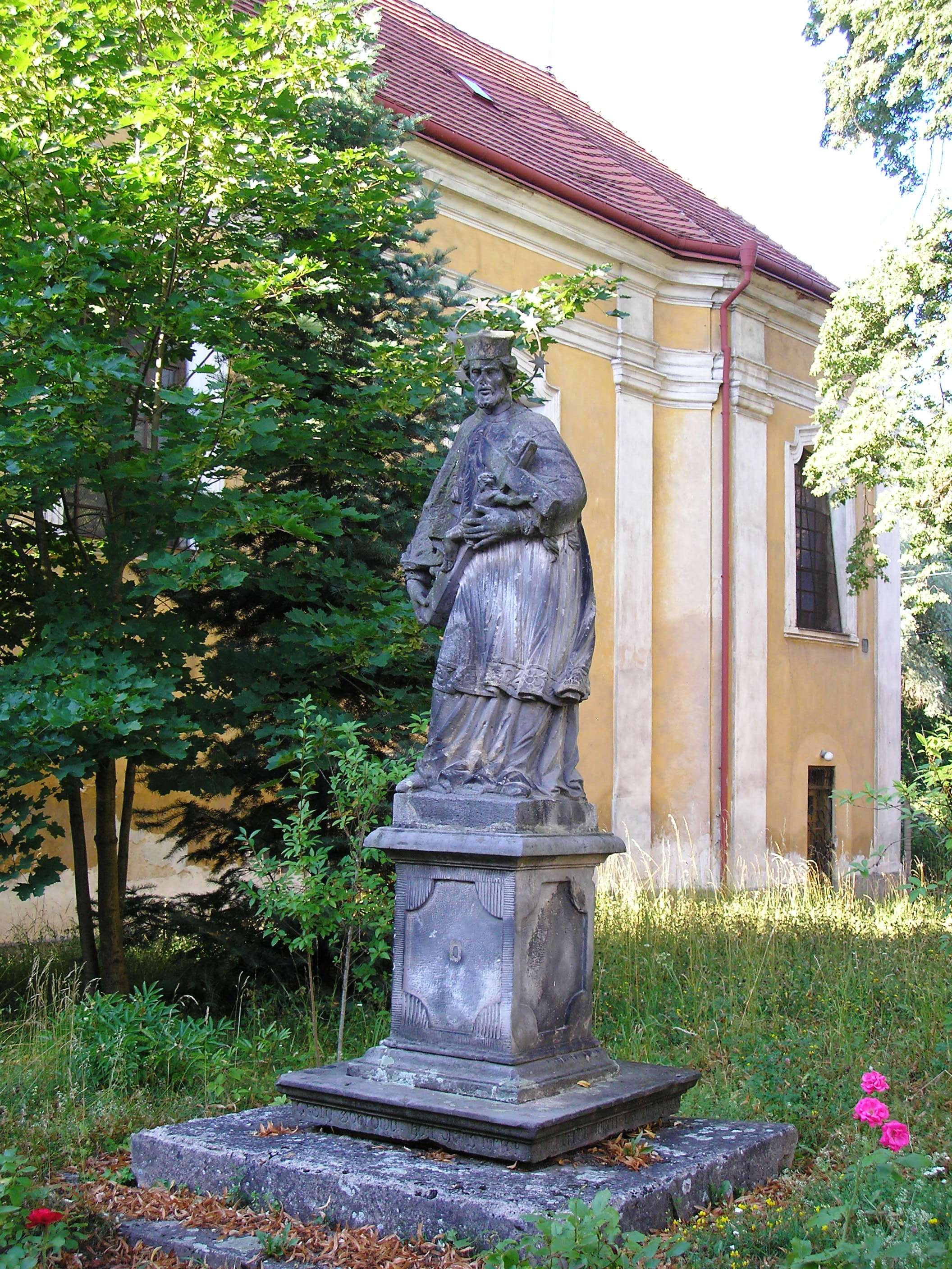 Socha sv. Jana Nepomuckého v Úvalech